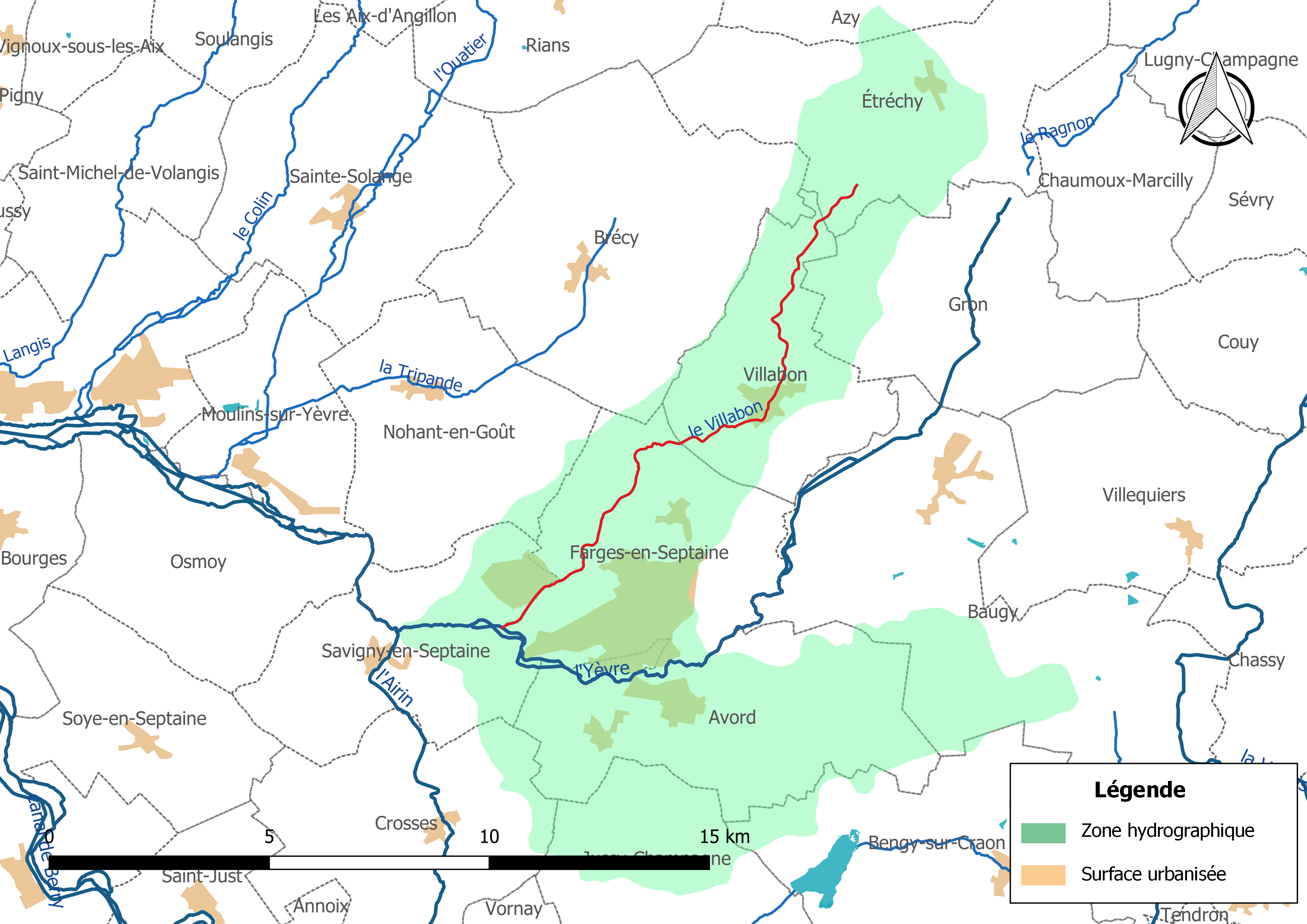 Carte du cours d'eau « le Villabon » (France) et de la zone hydrographique dans laquelle il s'insère.